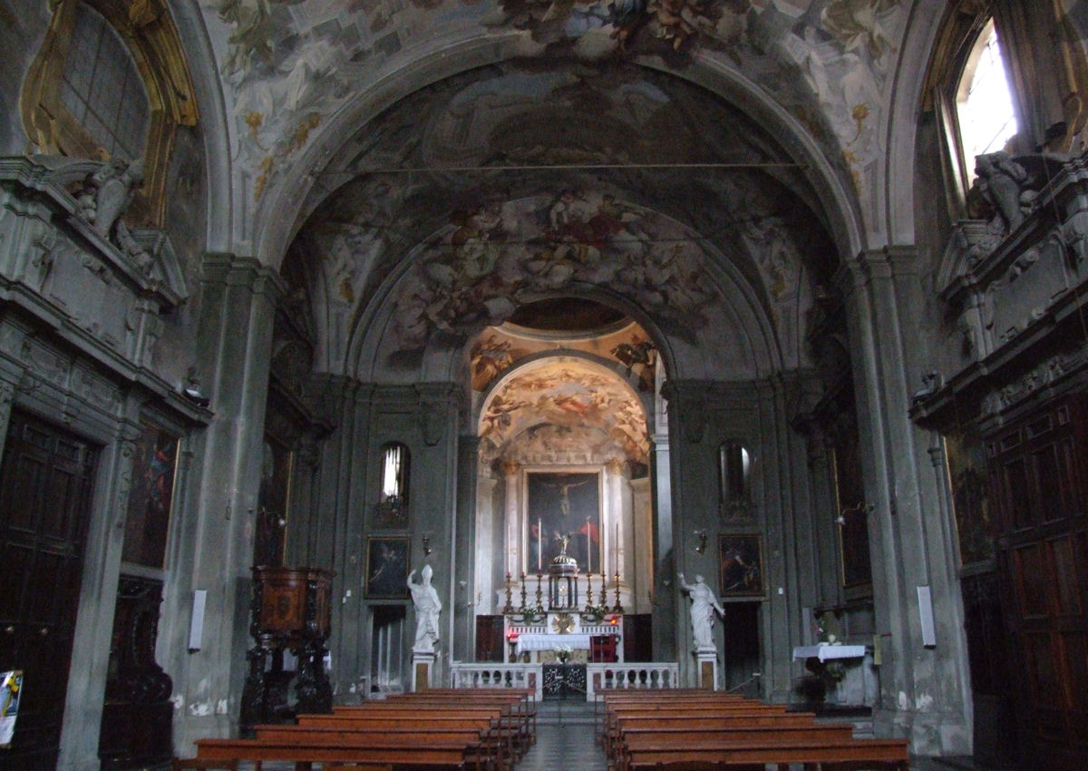 San Filippo, Pistoia, Italy